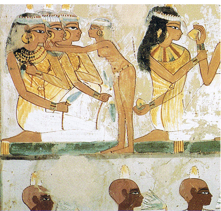 Ägypterinnen beim Fest und eine Dienerin